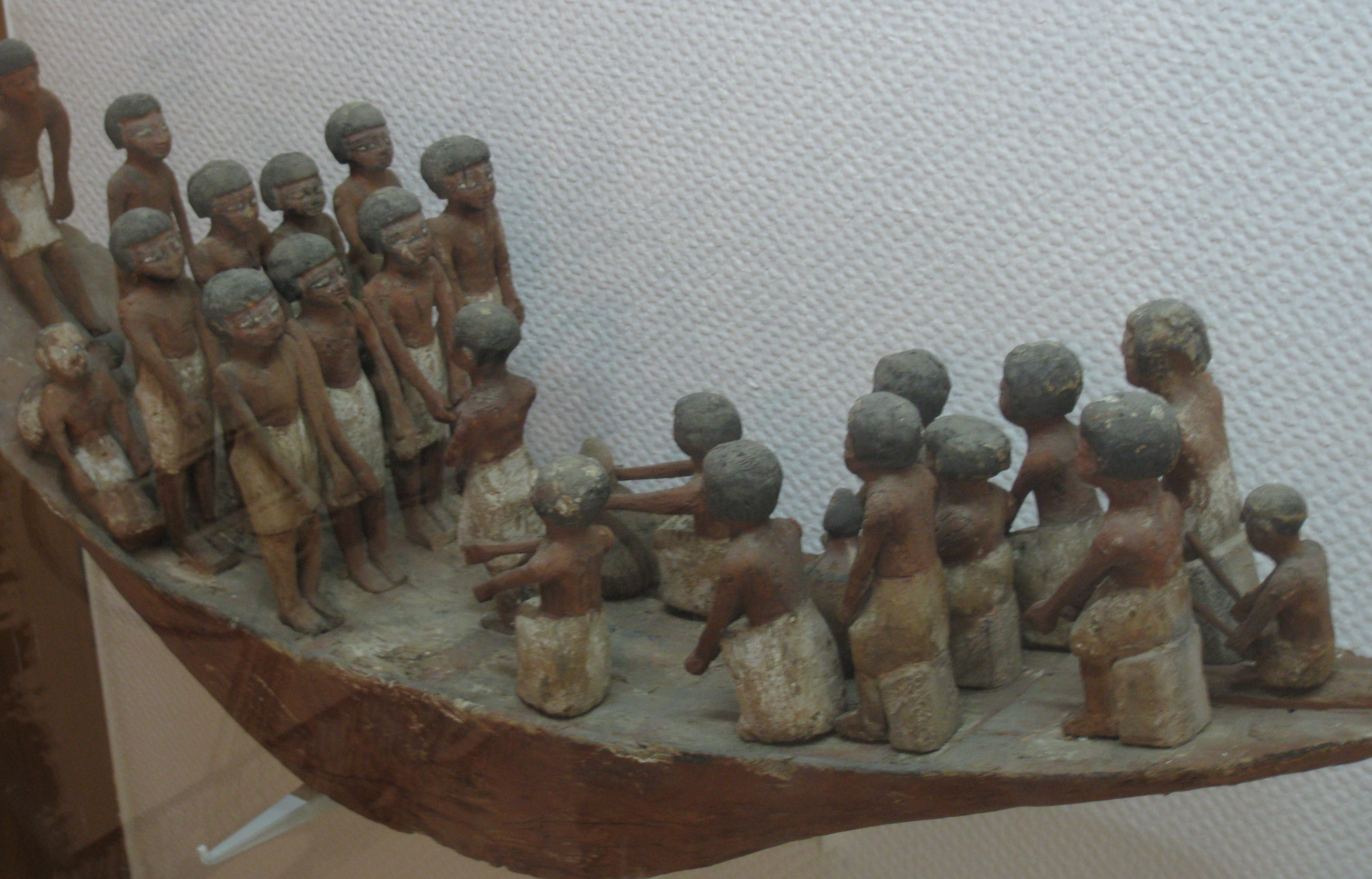 National Maritime Museum, Israel - Ship Models המוזיאון הימי הלאומי בחיפה דגמי ספינות Funerary Barques, Ancient Egypt Middle Kingdom, 11th Dynasty, 20th Century BC. Thew empty trone on the boat is for the soul of the dead person. סירות מתים מהממלכה התיכונה, שושלת י"א, המאה ה-20 לפני הספירה. האפיריון והכיסא הריק במרכז הסירה מיועדים לנשמת המת.